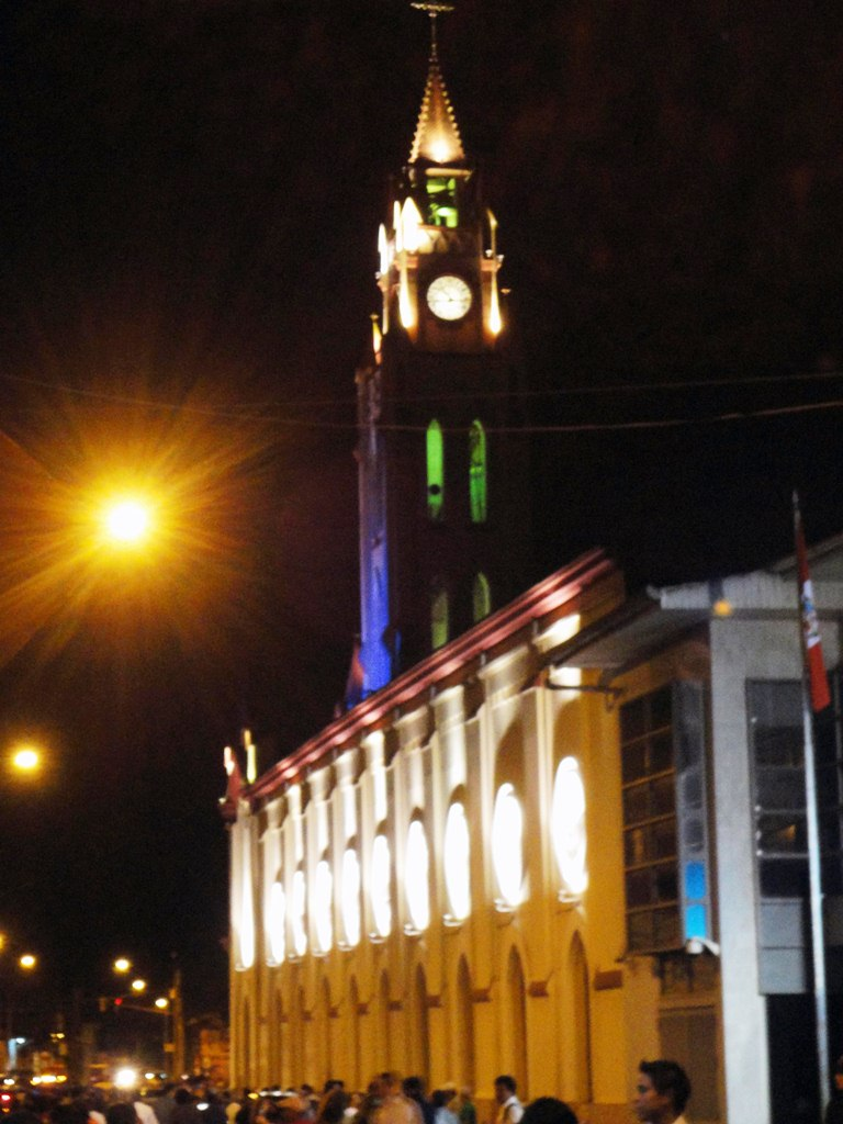 Iglesia Matriz de Iquitos iluminada con luces internas que mudan de color.